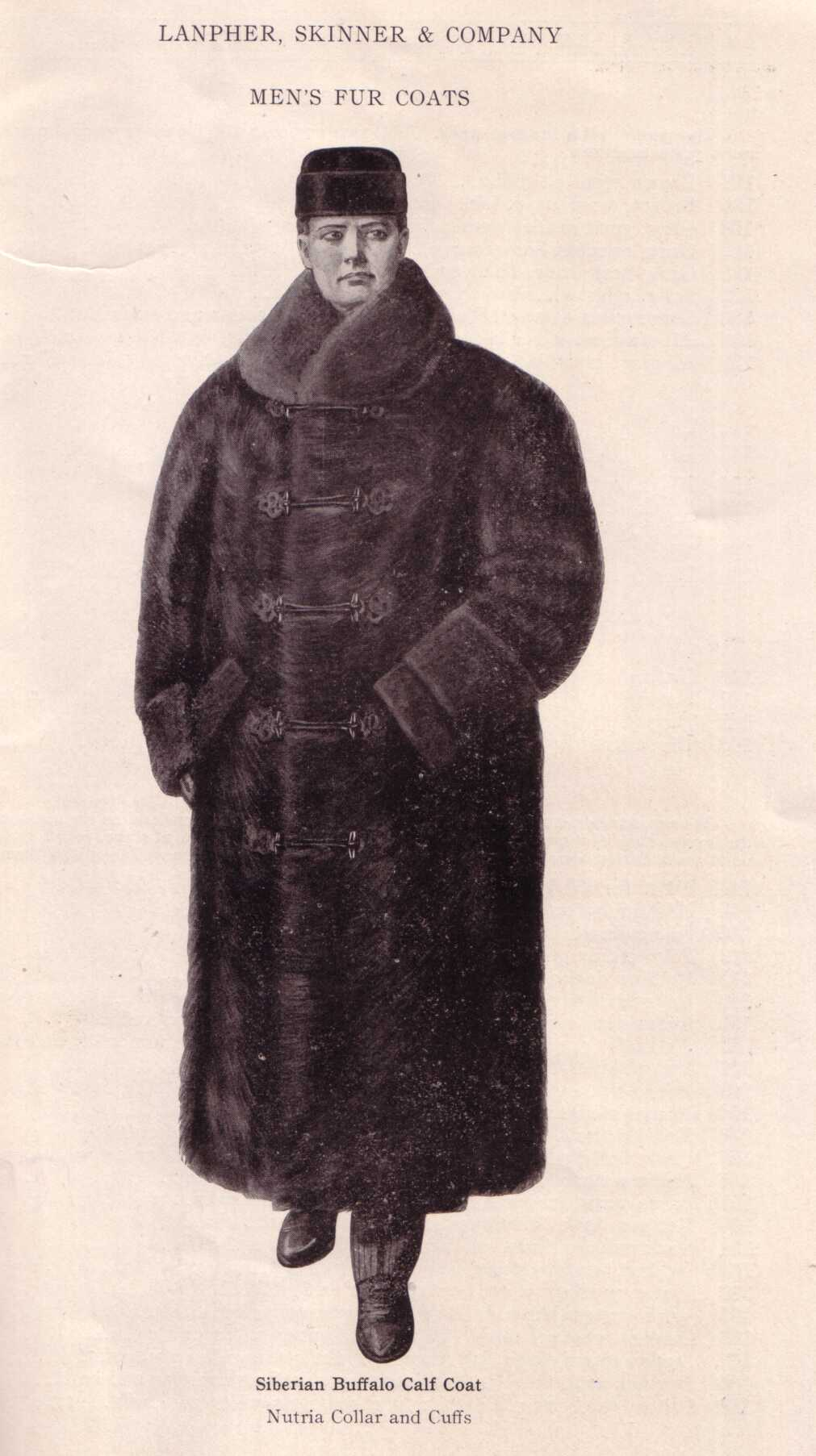 Fur Retail Trade Lanpher Furs; Men's Fur Coat: Sibirian Buffalo Calf Coat, Nutria Collars and Cuffs (without price) - Sibirischer Büffelkalb-Mantel, Nutriakragen und Manschetten